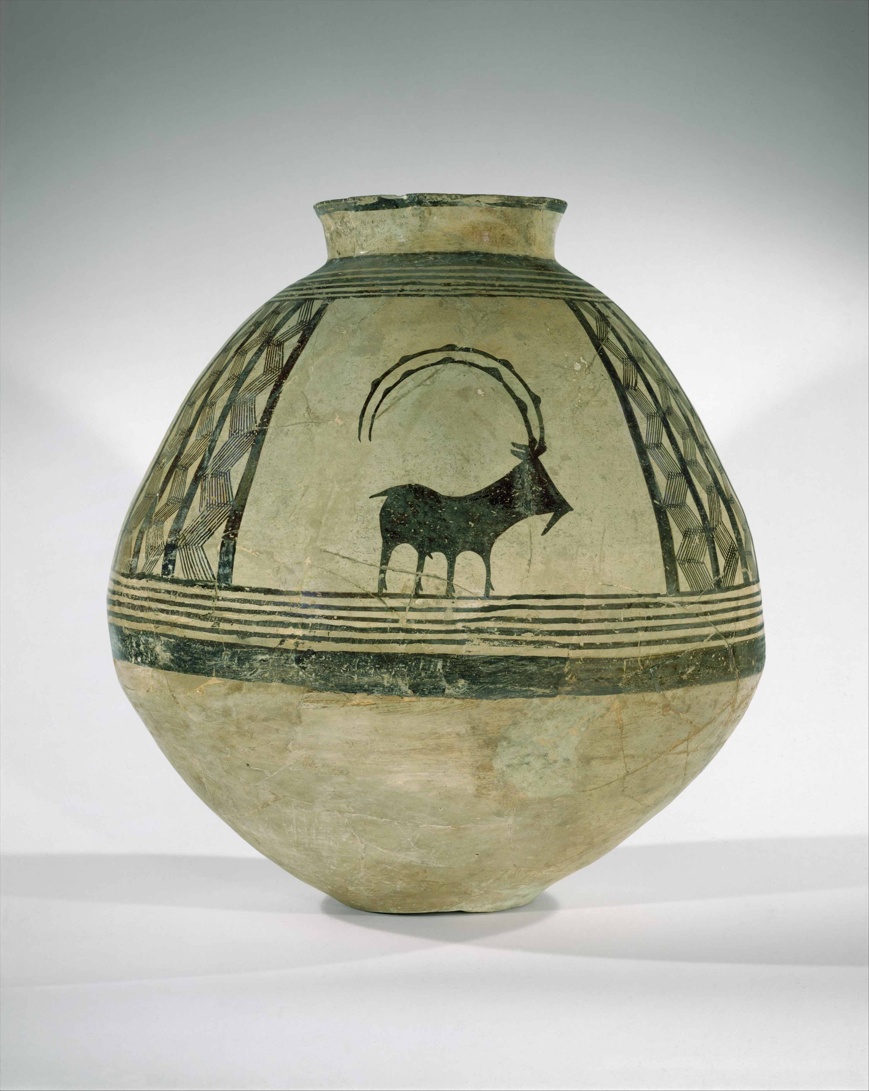 Jar; Ceramics-Vessels